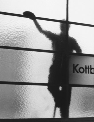 Aufnahme eines Fensterputzers am Kottbusser Tor In Berlin